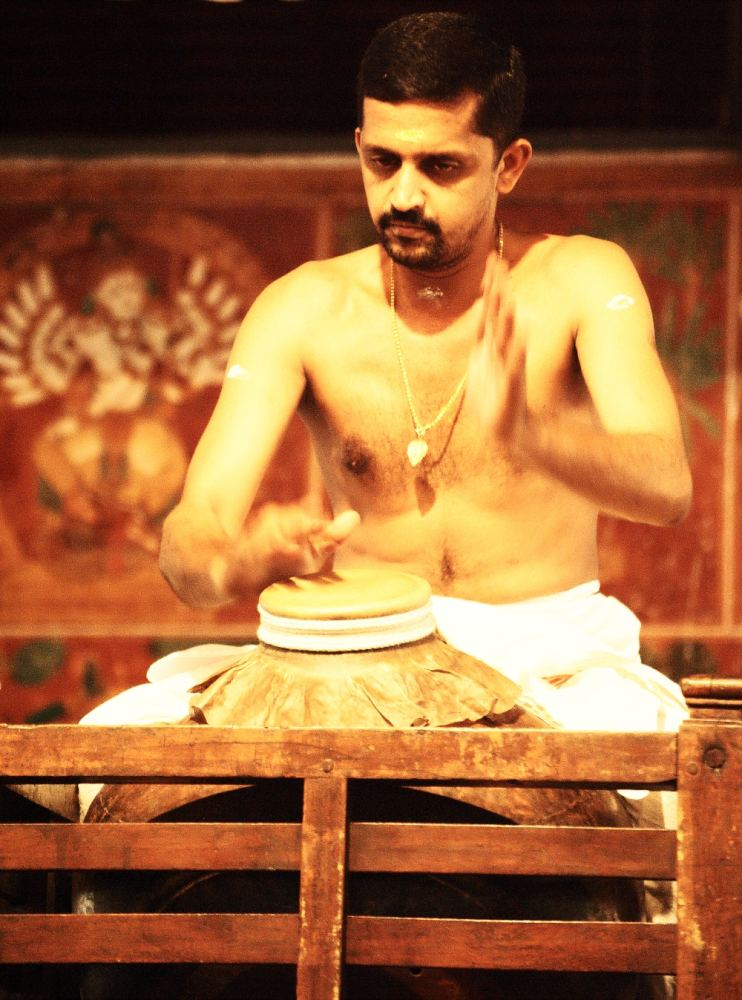 ചാക്യാർ കൂത്തിൽ മിഴാവു വായിക്കുന്ന കലാകാരൻ